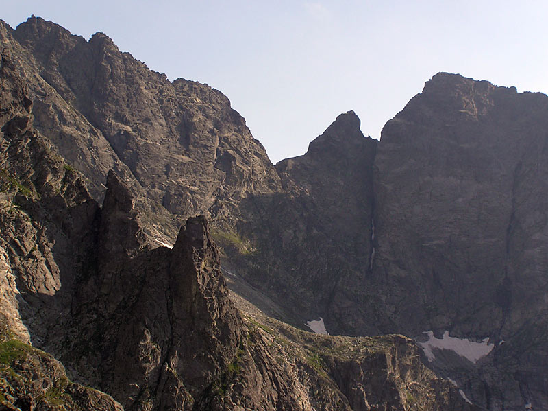 Tomkowe Igły w północno-zachodniej ścianie Niżnich Rysów i Żabi Koń (w centrum zdjęcia) od północy. Na Prawo od Żabiego Konia północna ściana Żabiej Turni Mięguszowieckiej. Poniżej nich wierzchołek Buli pod Rysami, przez którą przechodzi turystyczny szlak na Rysy.